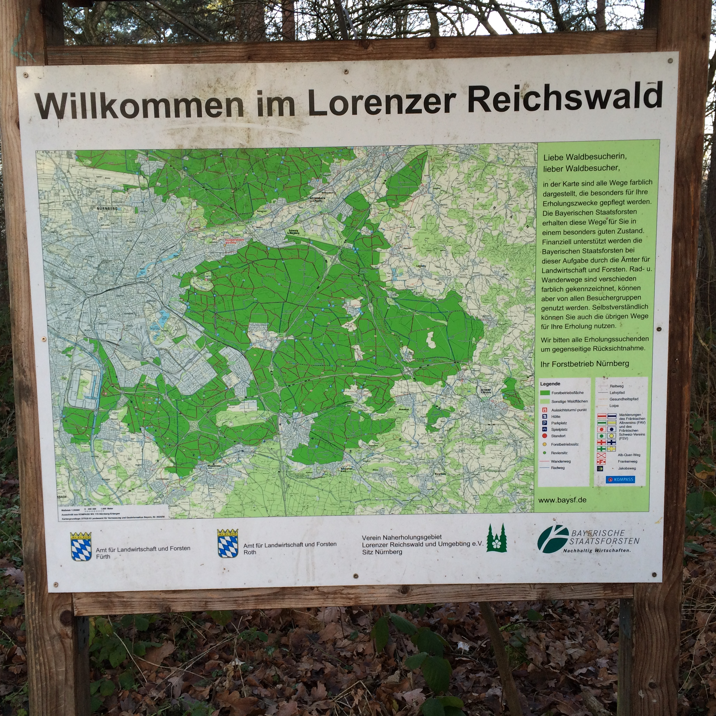 Nürnberg Lorenzer Reichswald Karte